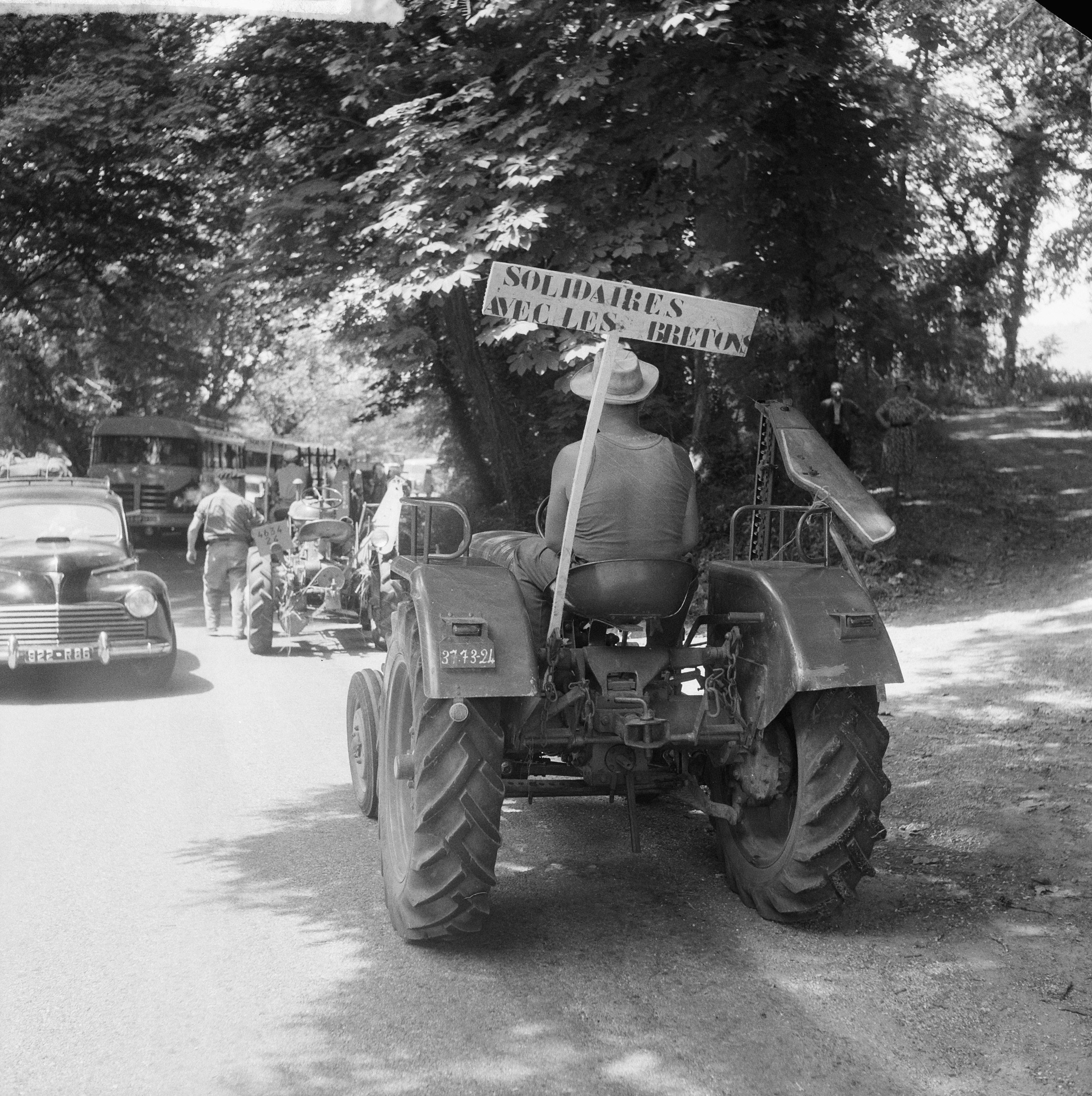 Collectie / Archief : Fotocollectie Anefo Reportage / Serie : [ onbekend ] Beschrijving : Solidariteitsstaking in Frankrijk. Weg versperd met tractoren Datum : 24 juni 1961 Locatie : Frankrijk Trefwoorden : TRACtorens Fotograaf : Nijs, Jac. de / Anefo Auteursrechthebbende : Nationaal Archief Materiaalsoort : Negatief (zwart/wit) Nummer archiefinventaris : bekijk toegang 2.24.01.03 Bestanddeelnummer : 912-6435